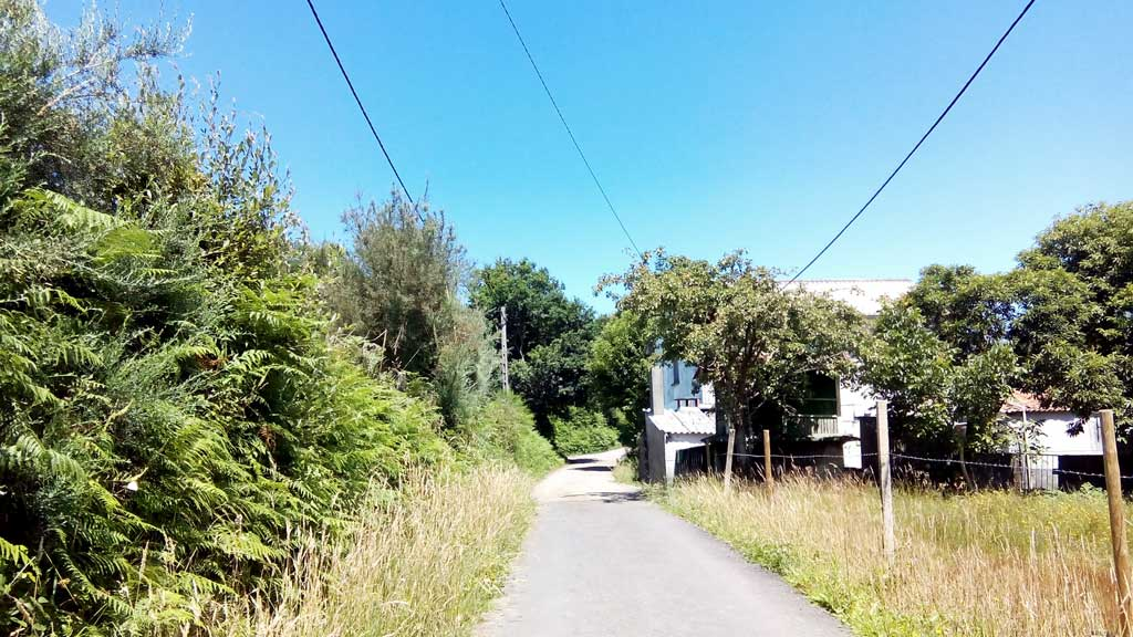 Vista da Pena, Curtis.